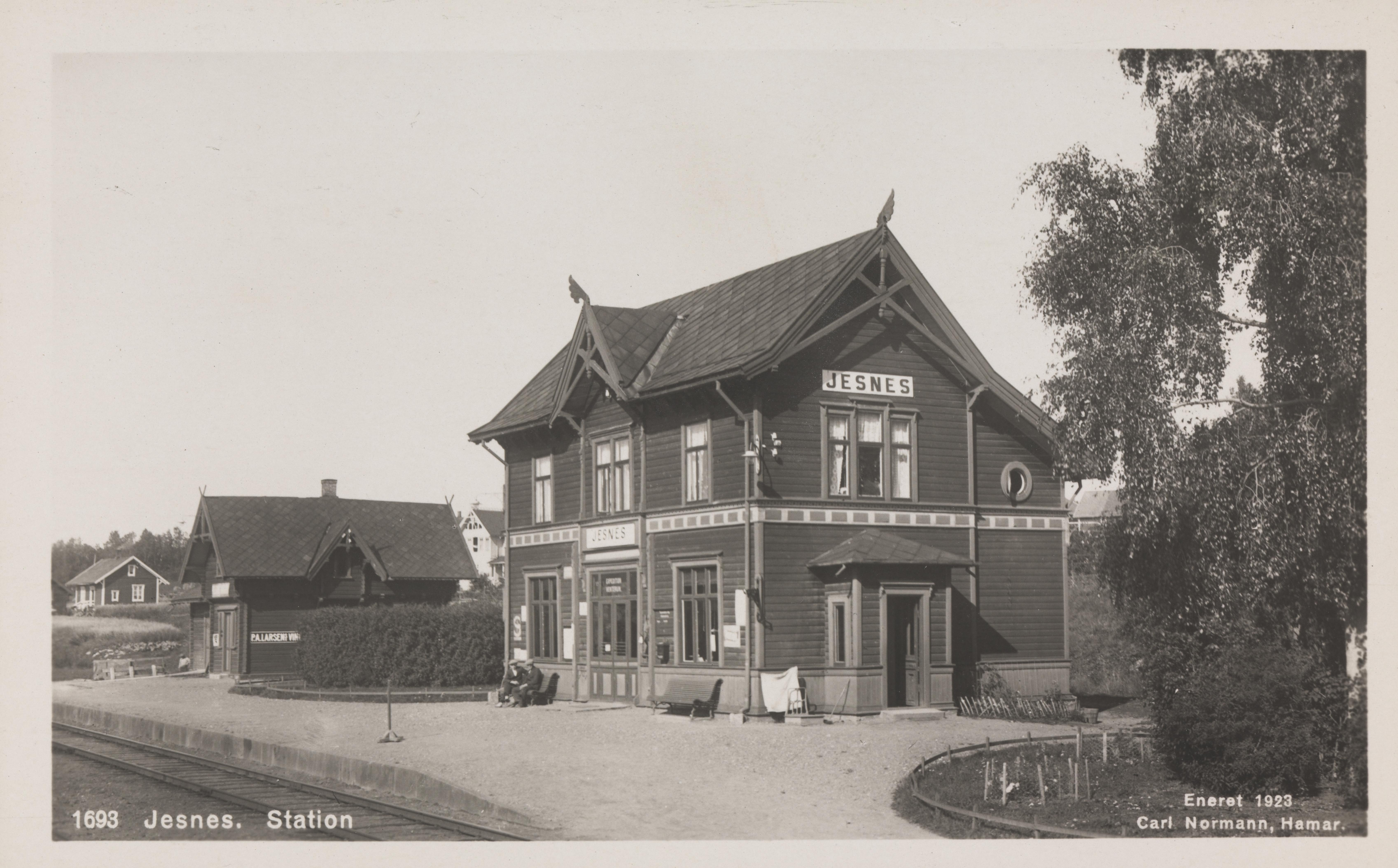 Bildet er hentet fra Nasjonalbibliotekets bildesamling Jessnes,Jessnes stasjon, Ringsaker, Hedmark